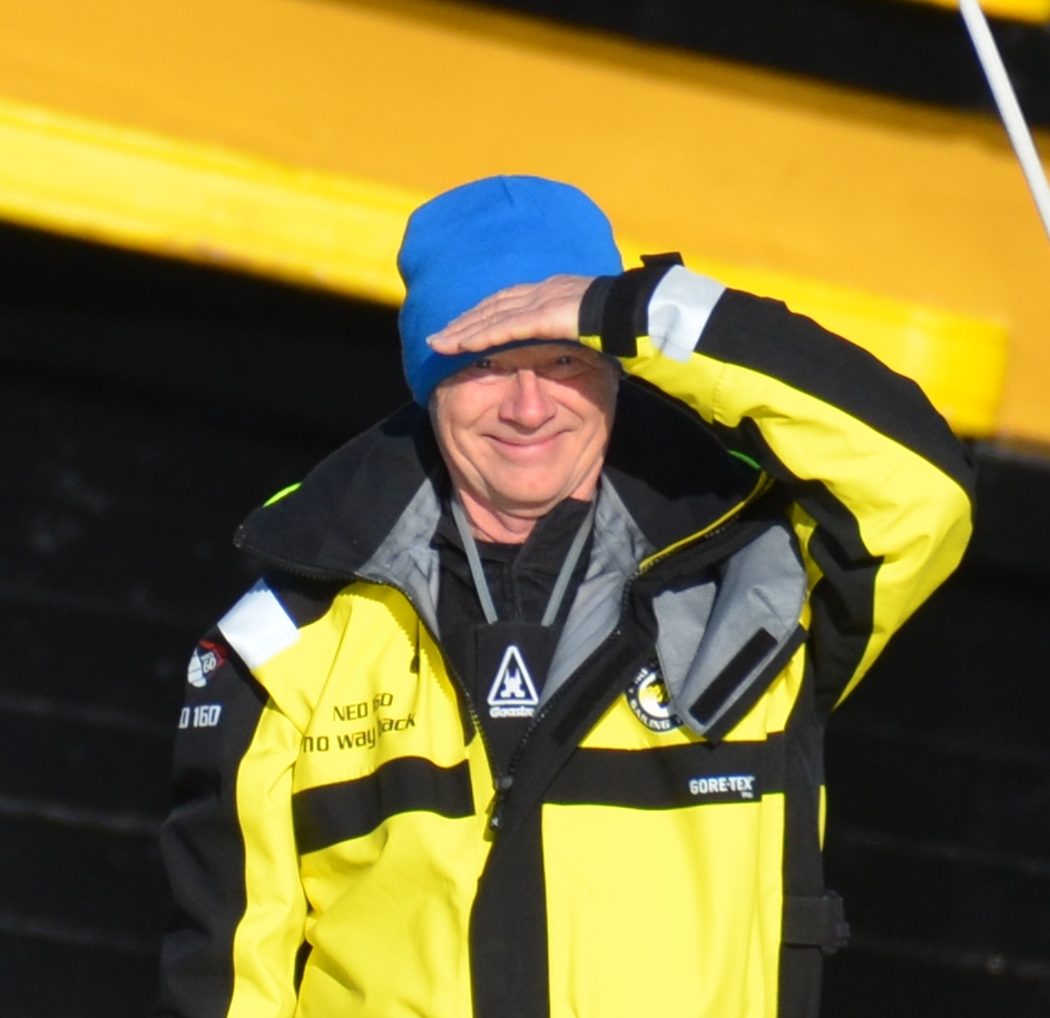 Pieter Heerema au départ du Vendée Globe 2016-2017